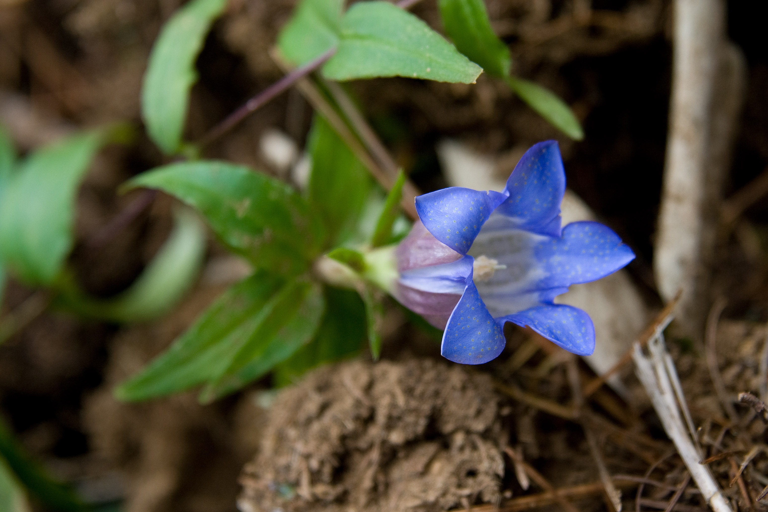 ツルリンドウ (学名:Tripterospermum japonicum)